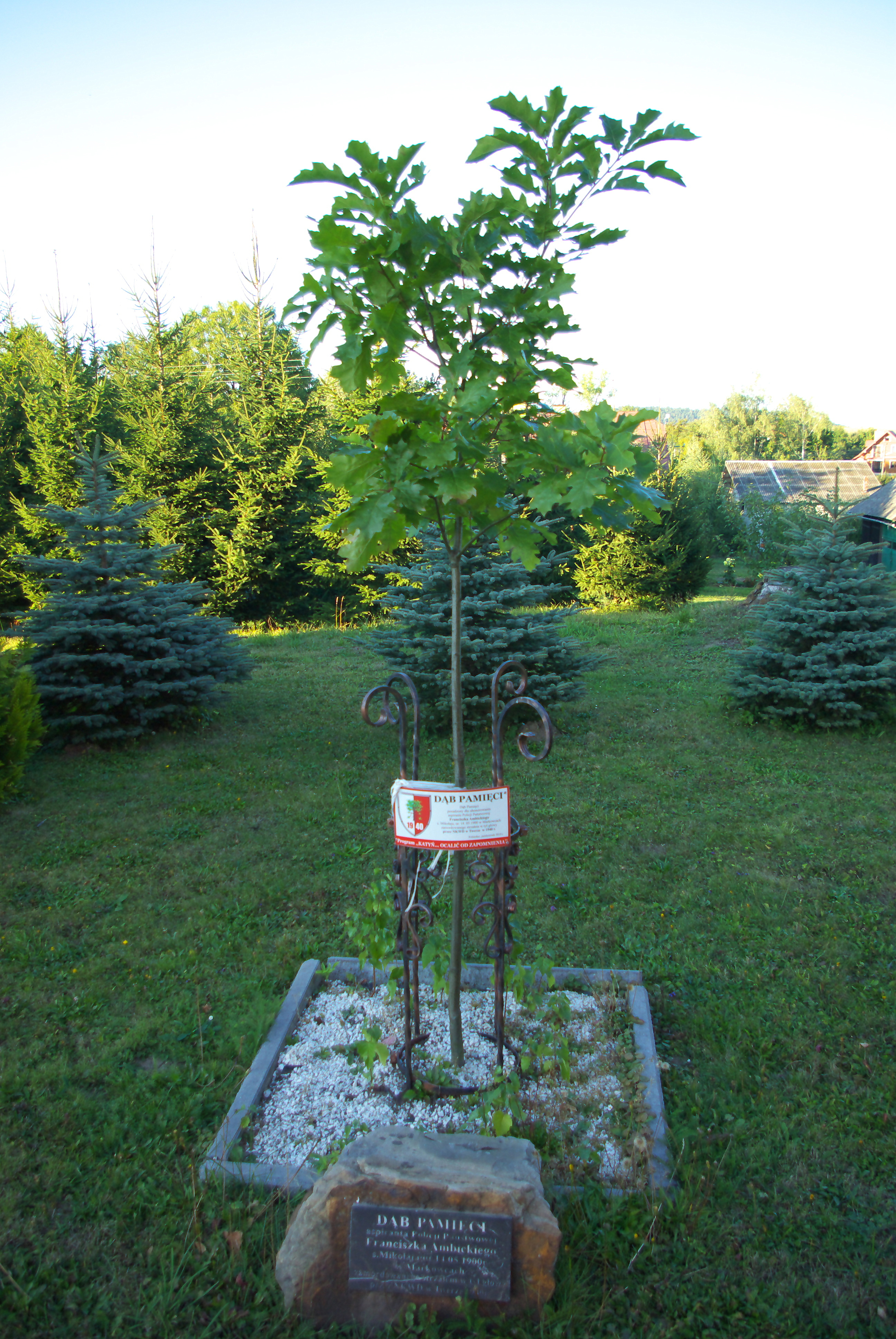 Dąb Pamięci w hołdzie asp. Franciszkowi Ambickiemu (1900-1940) posadzony w Markowcach przy kościele